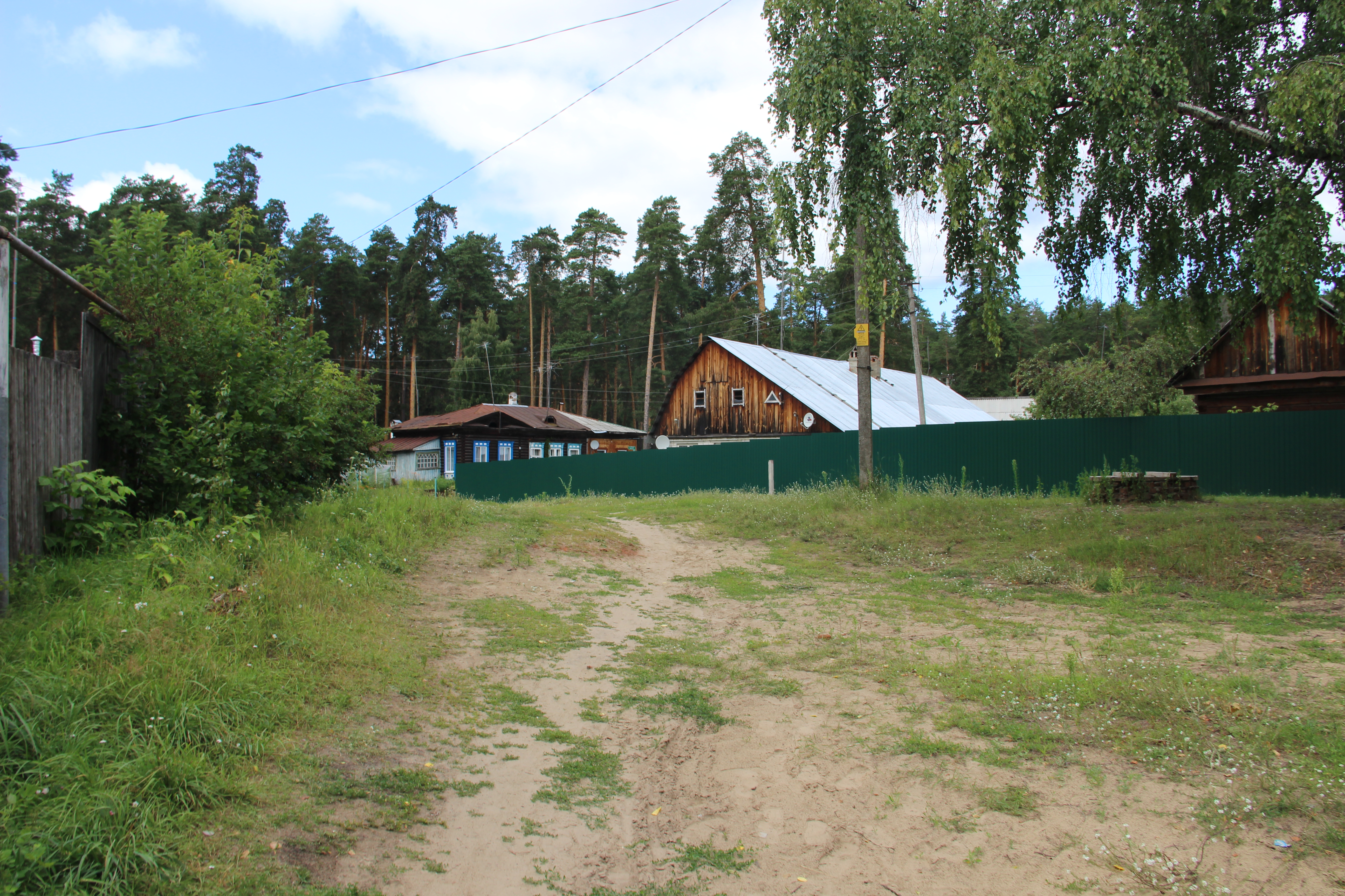 А почва здесь песчаная. Раифский дендрарий. Пос. Садовый. Зеленодольский р-н. РТ. Июль 2014